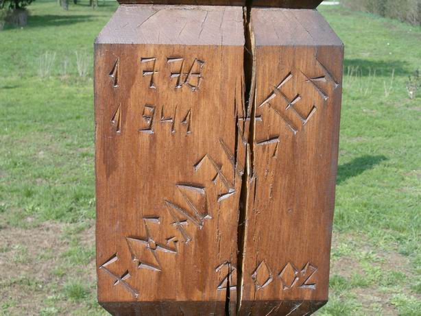 Detail from Kopjafa